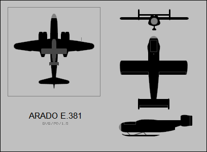 Arado E.381 by Greg Goebel